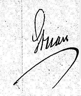 Handtekening van Jacobus Stuart (1803-1878), oprichter van de Nederlandsche Vereeniging tot Afschaffing van Sterken Drank